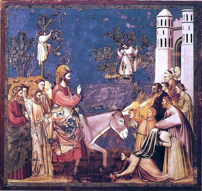 Giotto, Scrovegni Chapel The entry into Jerusalem